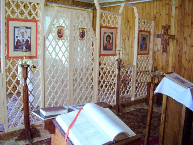 Храм в честь святых равноапостольных Кирилла и Мефодия в Саргатском